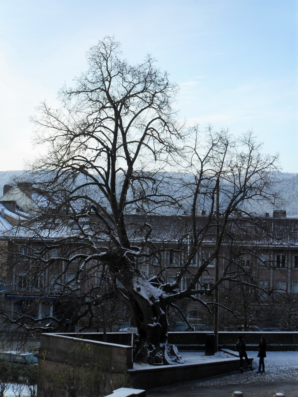 Vue de la place du Tilleul depuis la plate-forme ou ancien parking du Musée de Saint-Dié (Vosges, France).